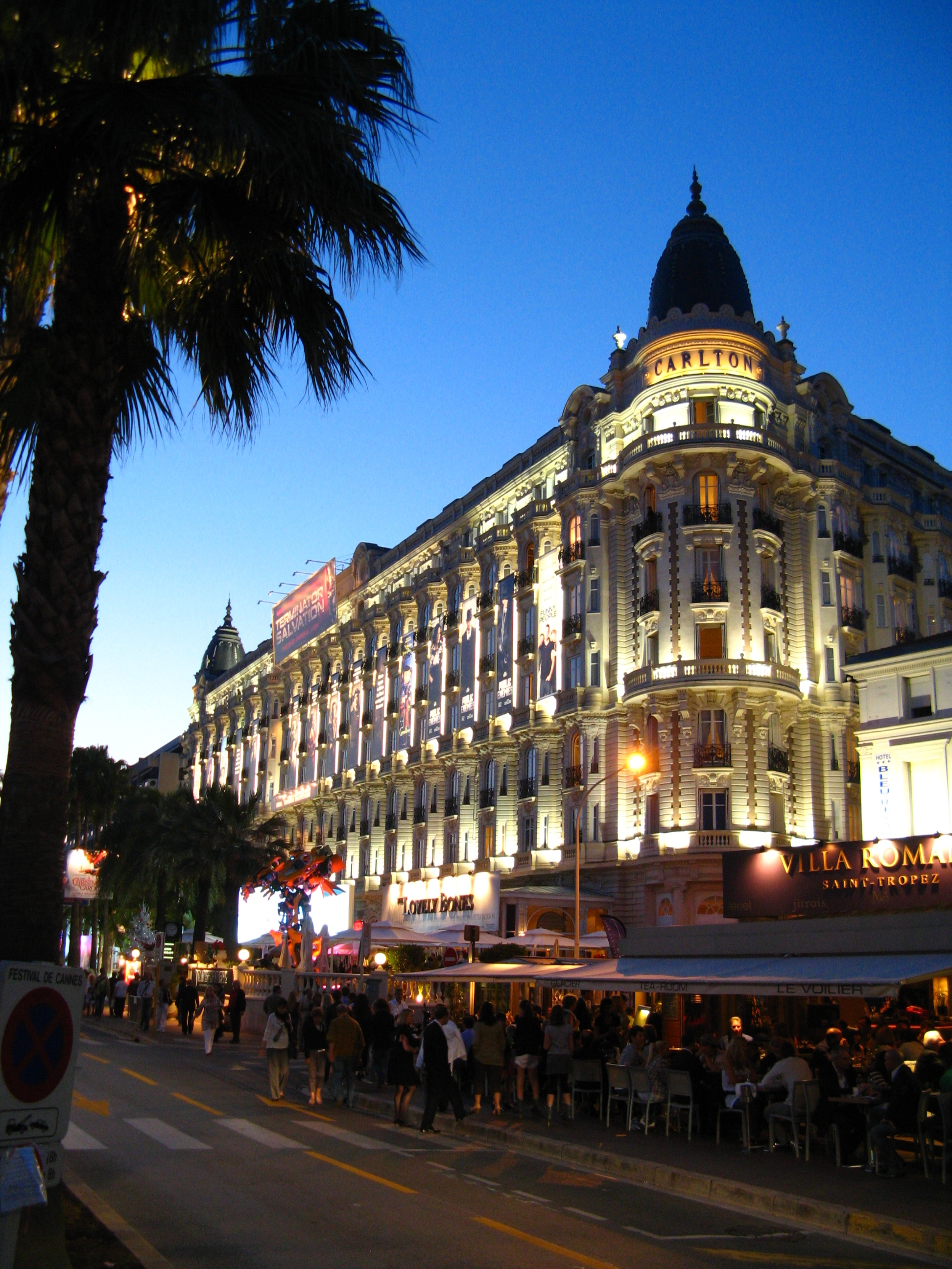 L'Hôtel Carlton à Cannes, à la tombée de la nuit pendant le Festival du Film 2009.